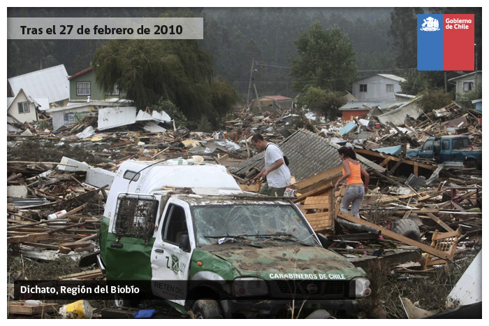 Dichato, Chile, tras el terremoto y Tsunami del 27 de Febrero de 2010.